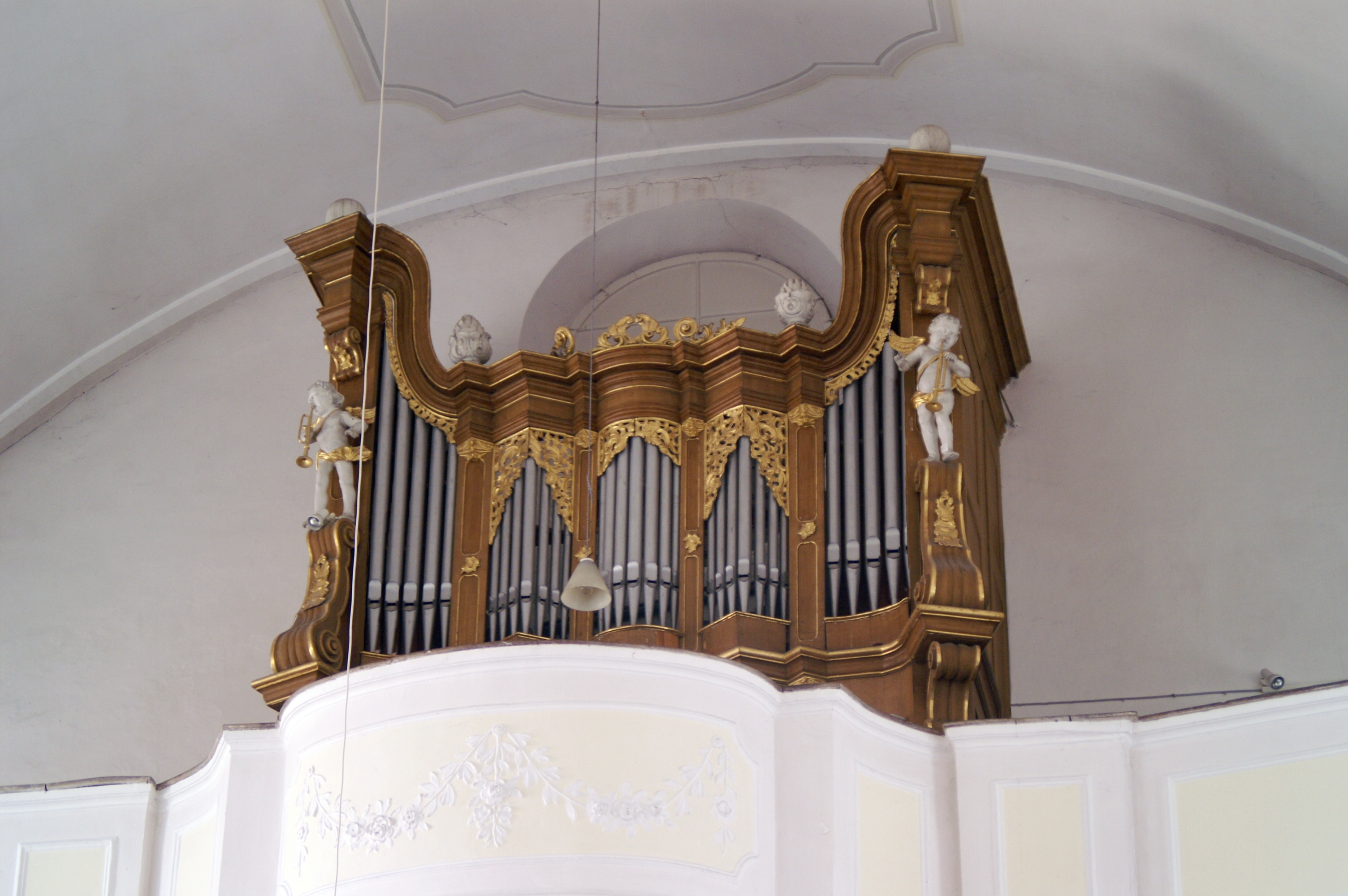 Orgel der Marienkiche in Haindling